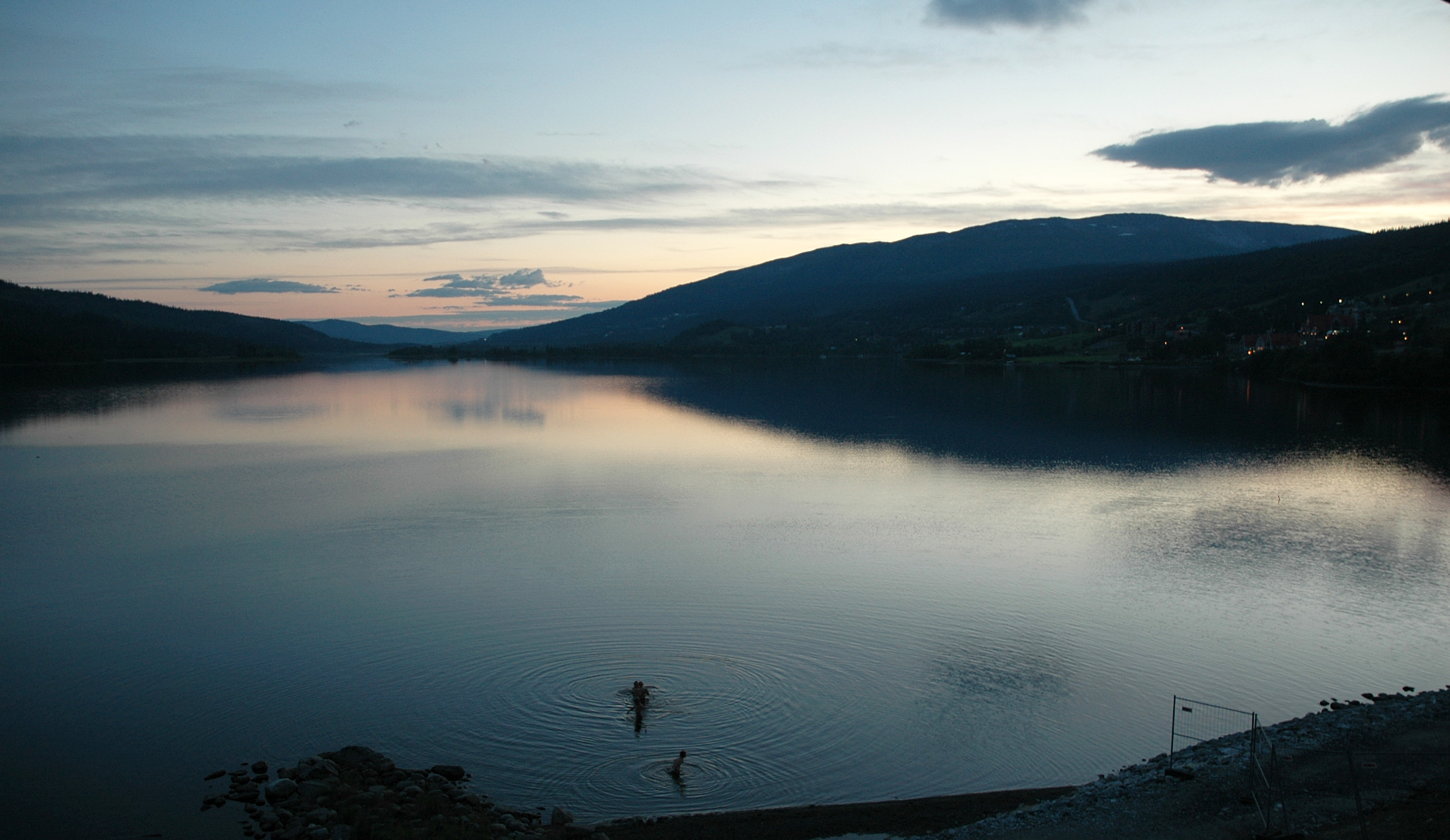 Åresjön vid Åre i Jämtlands län